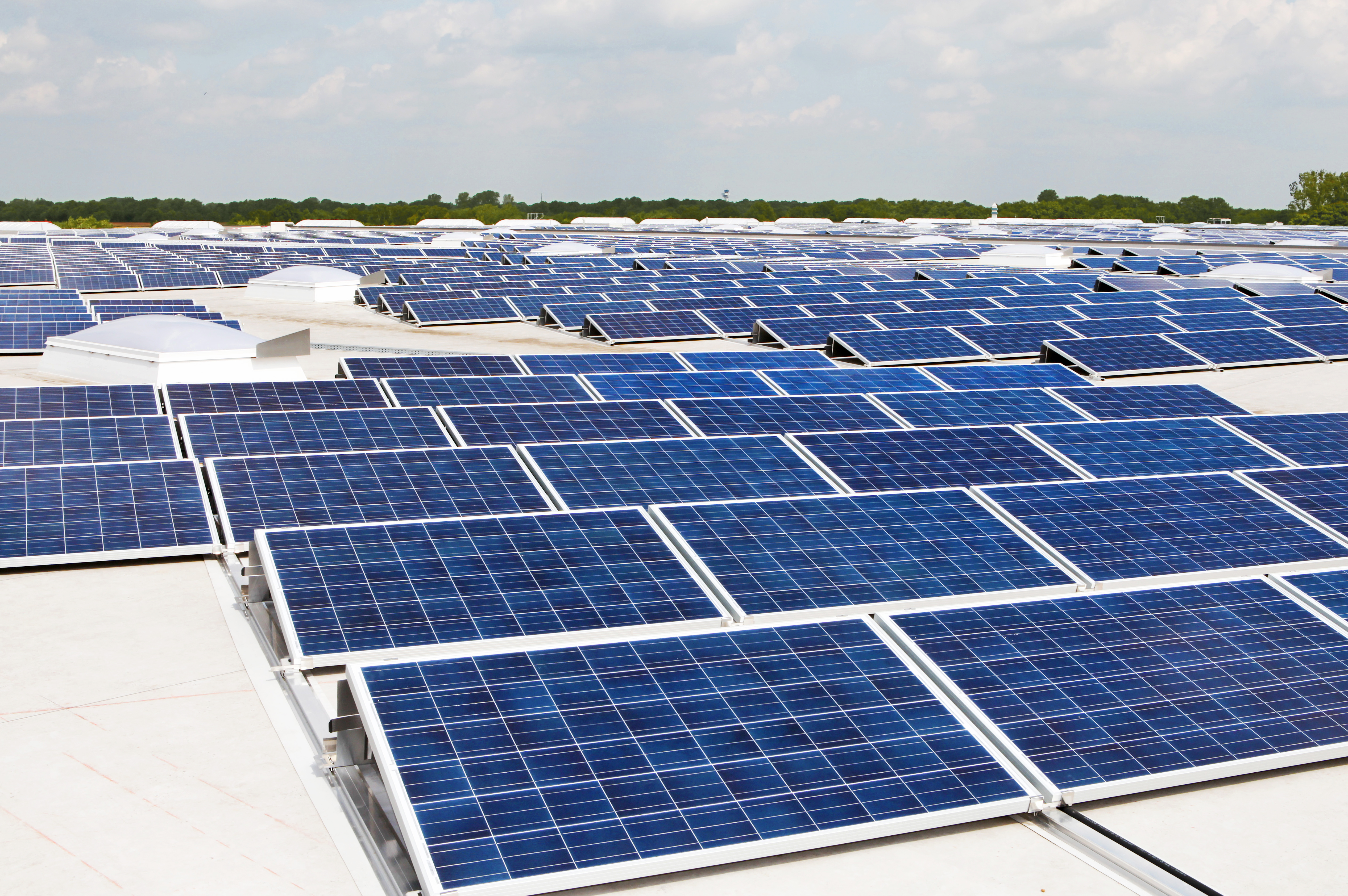 Photovoltaik Dachanlage Hannover - Schwarze Heide - Leistung 1 MW